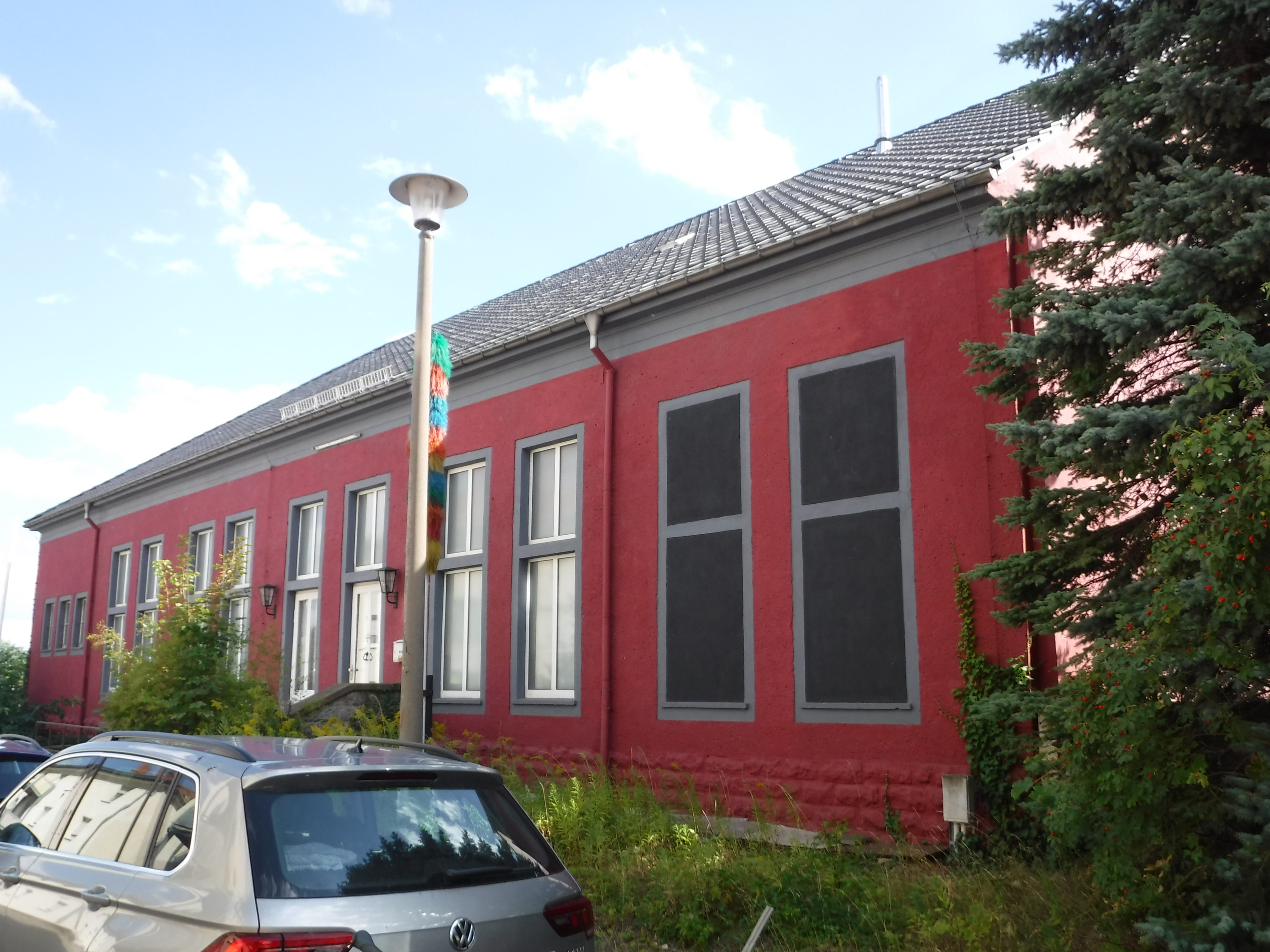 Ehemaliges Kulturhaus, heute Atelier des Bildenden Künstlers Eberhard Bosslet. Von ihm ‚Uferhalle am Schloss‘ genannt